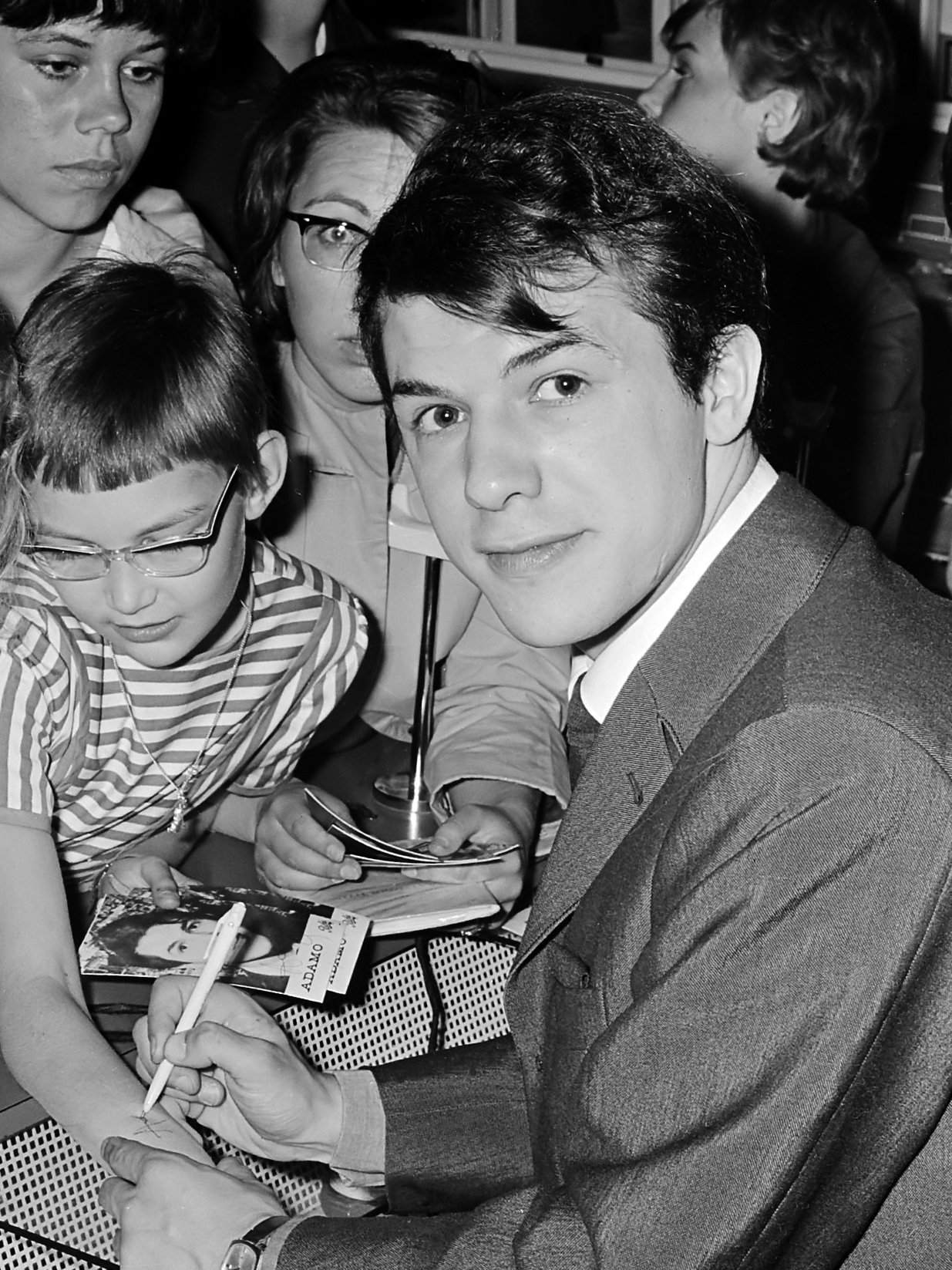 Adamo in Rotterdam, Belgische zanger in grammofoonplatenzaak deelt hij handtekeningen uit 20 mei 1964